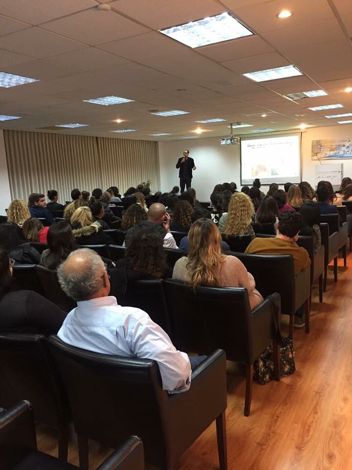 שי עמית מרצה